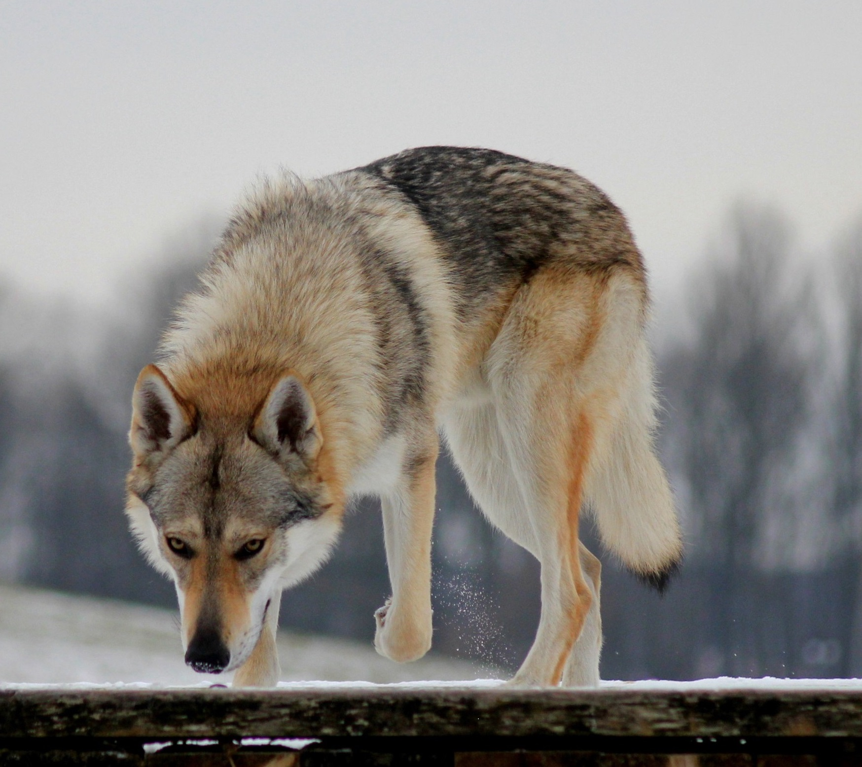 Czechosłowacki Wilczak Quebeck II od Úhoště (Bohun) Československý vlčák